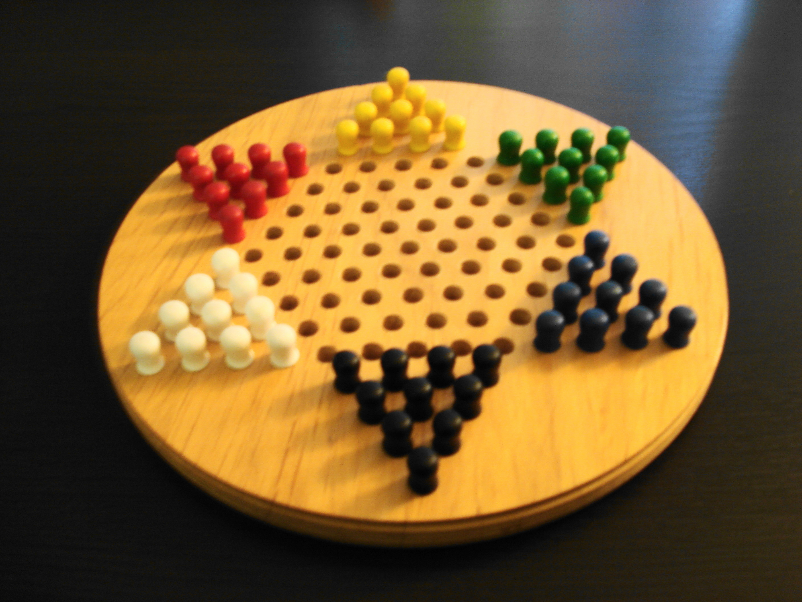 Photo d'un jeu de dames chinoises en bois.